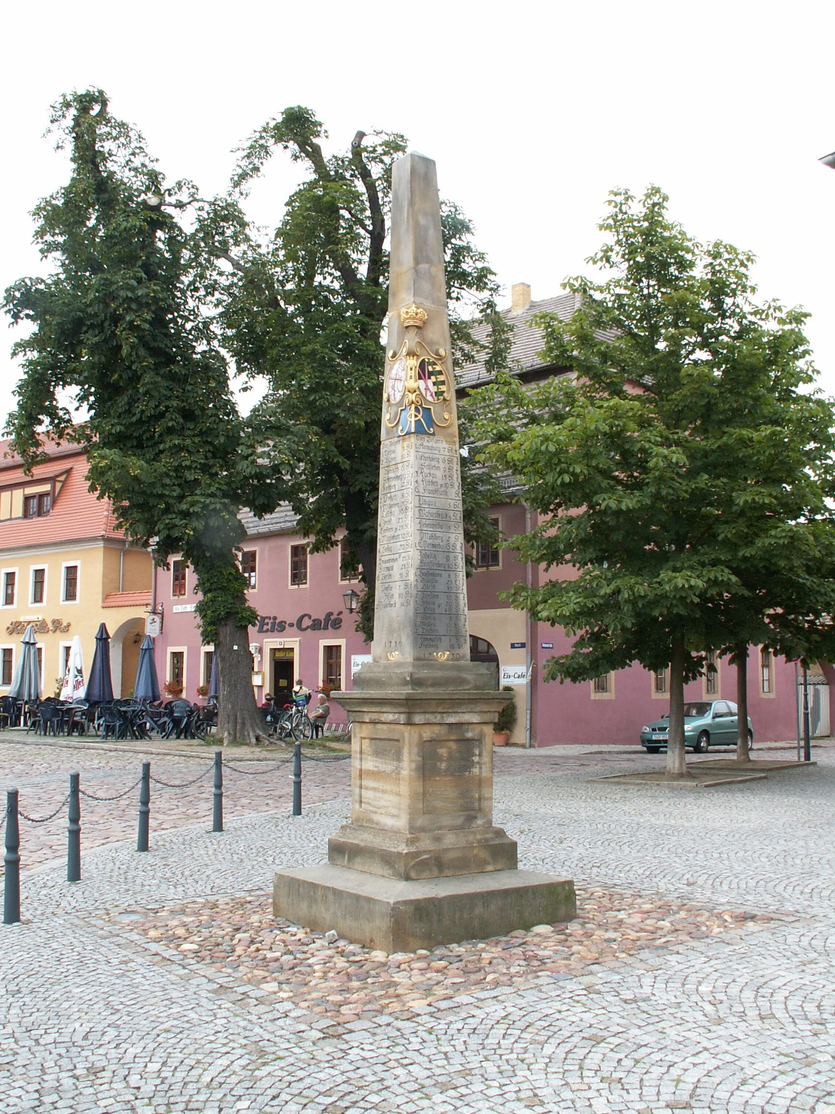 Kursächsische Postmeilensäule in Belgern, errichtet 1730, 1798 renoviert, 1927 farblich erneuert